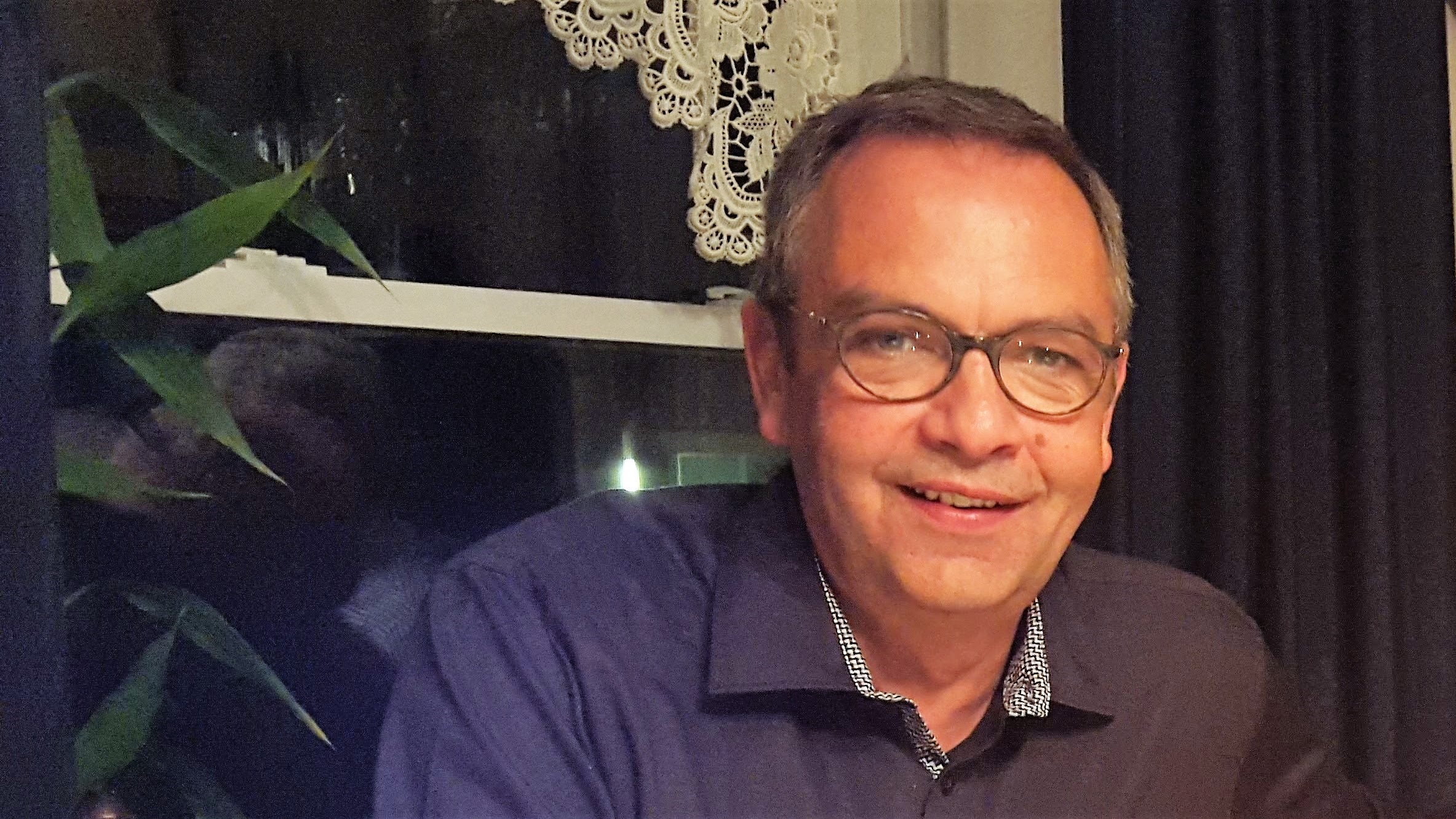 Axel zu Besuch Thanksgiving 2015